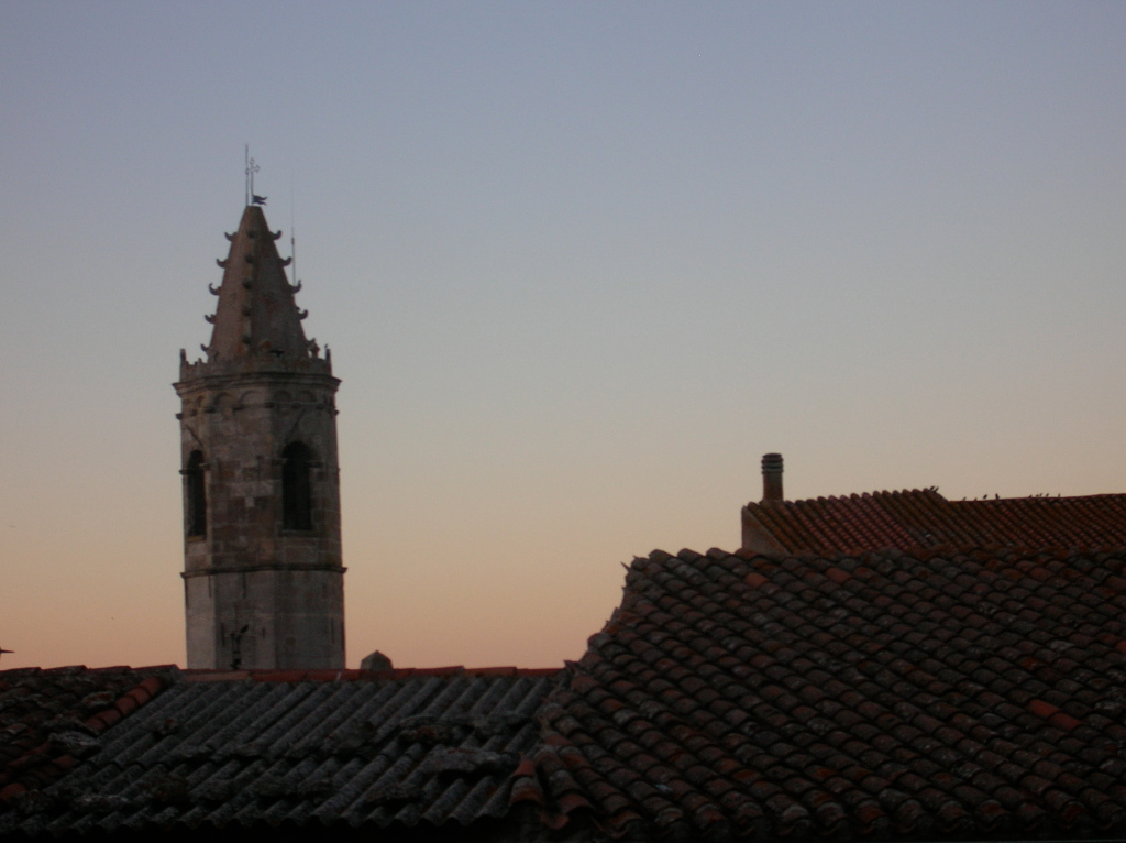 Cossoine, provincia di Sassari, chiesa di Santa Giara (Santa Chiara).